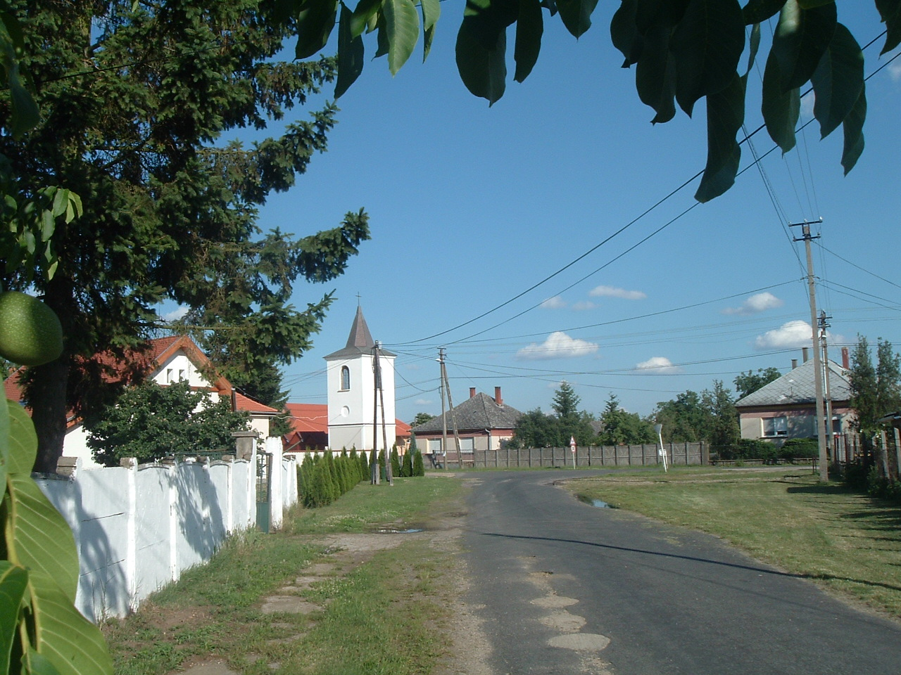 Szenttamás (Püspökmolnári), Hungary